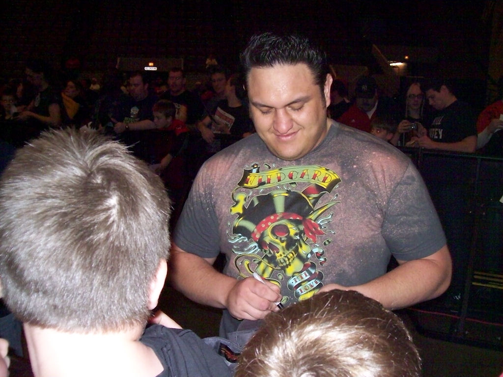 Samoa Joe